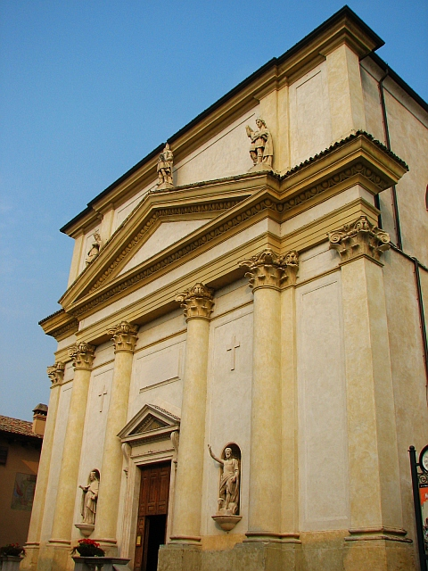 Lazise, Lago di Garda: Chiesa parrocchiale dei Santi Zeno e Martino.